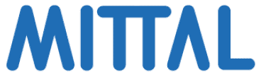 логотип Mittal Steel Company